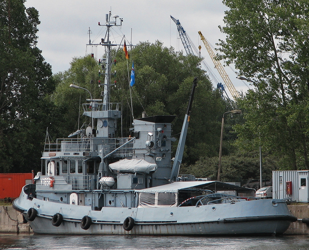 Beschreibung: Schlepper Wustrow Y1656 / Marinestützpunkt Hohe Düne Fotograf: Darkone, 13. August 2005